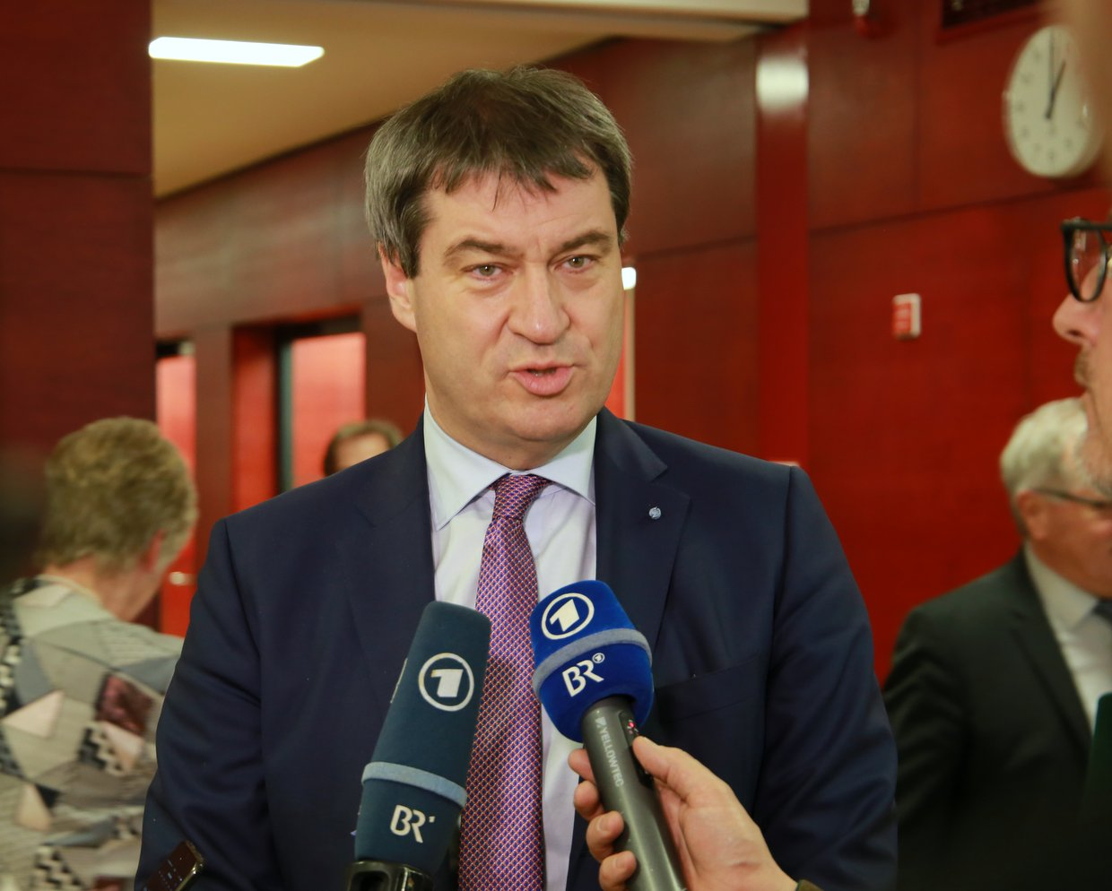 Markus Söder (CSU) spricht vor Beginn der CSU-Fraktionssitzung mit Pressevertretern (Datum: 30. Januar 2018) Titel des Werks: "Markus Söder im Gespräch mit Journalisten"